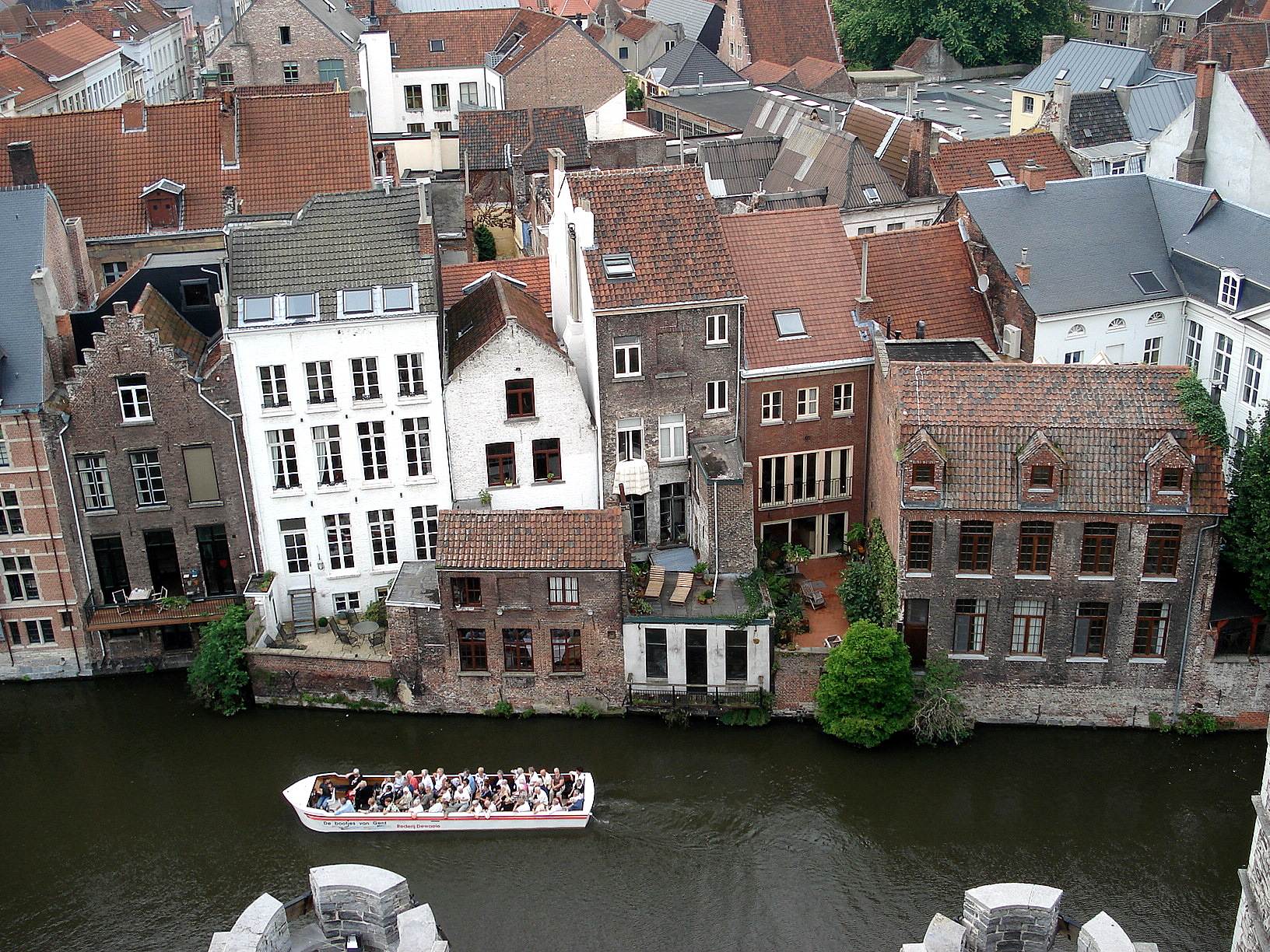 Lievekanaal te Gent, foto getrokken vanuit meestentoren Gravensteen.